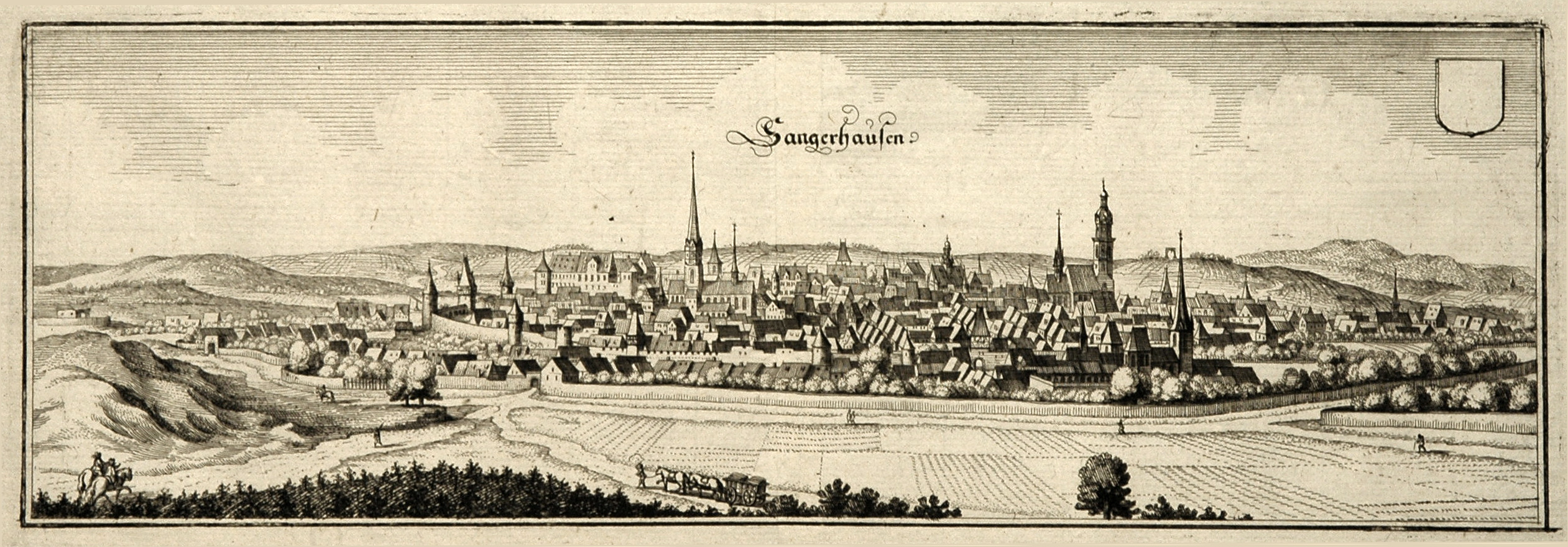 Kupferstich 10,5 x 31,5cm von Merian um 1650